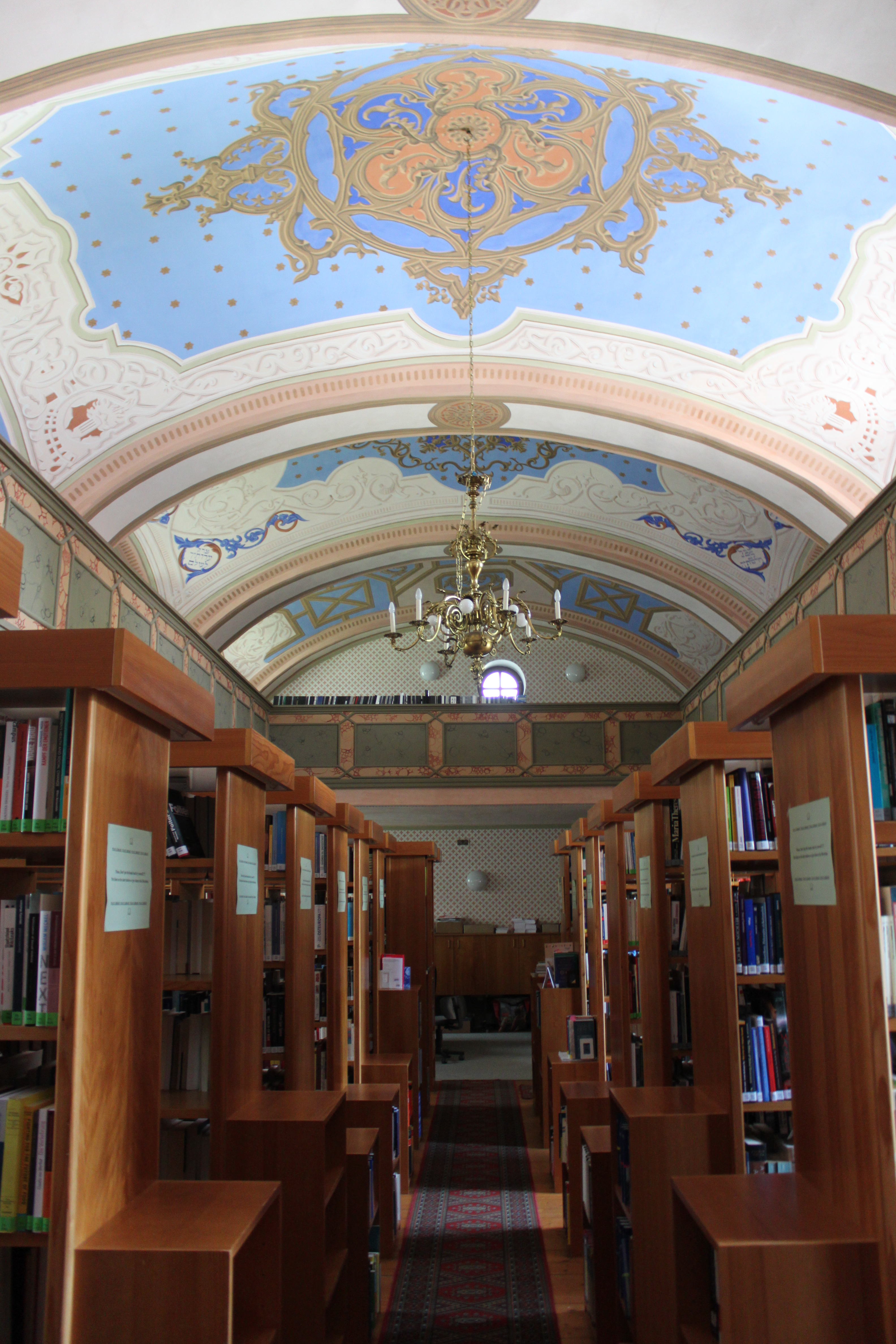 Synagoge Tempel, Bibliothek-Nutzung, Blick nach hinten, Empore